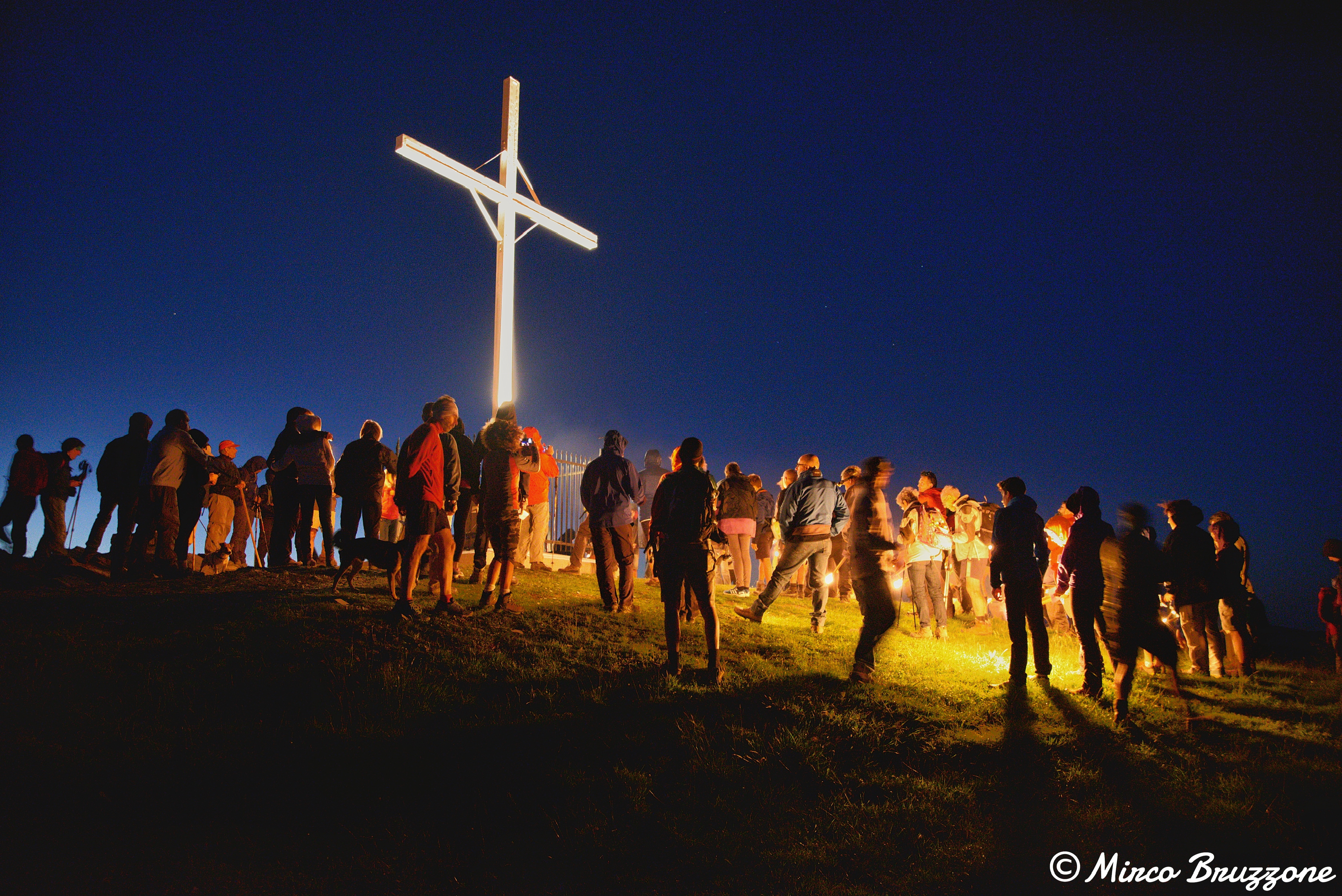 fiaccolata in Antola per S.Pietro